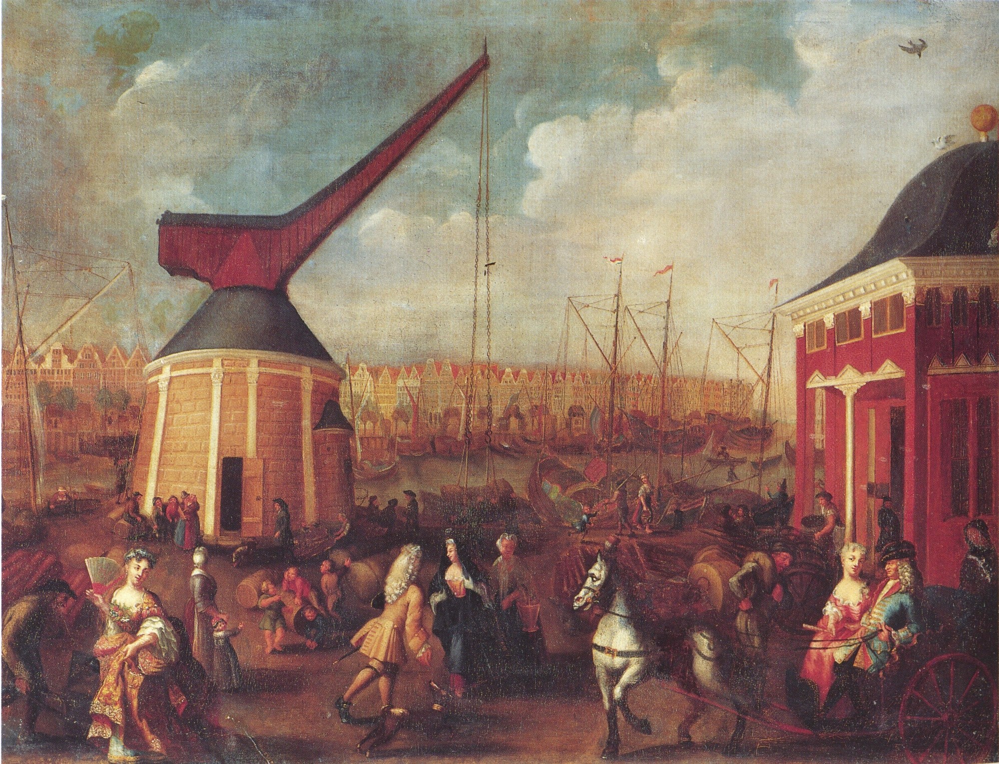 Gemälde: Der neue Krahn und Stadt-Waage im Hamburger Hafen